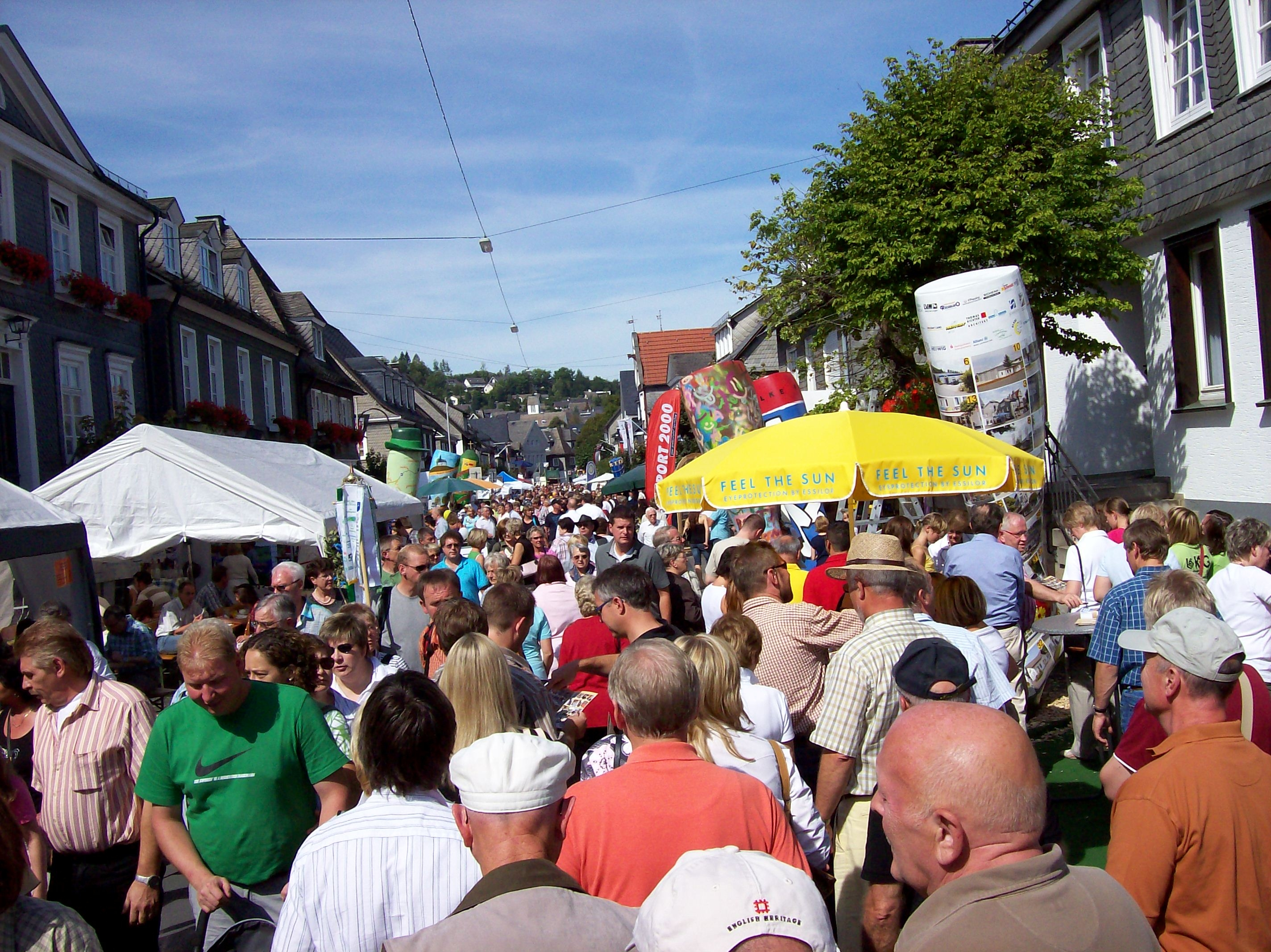 Schmallenberger Woche 2008 (Weststraße)